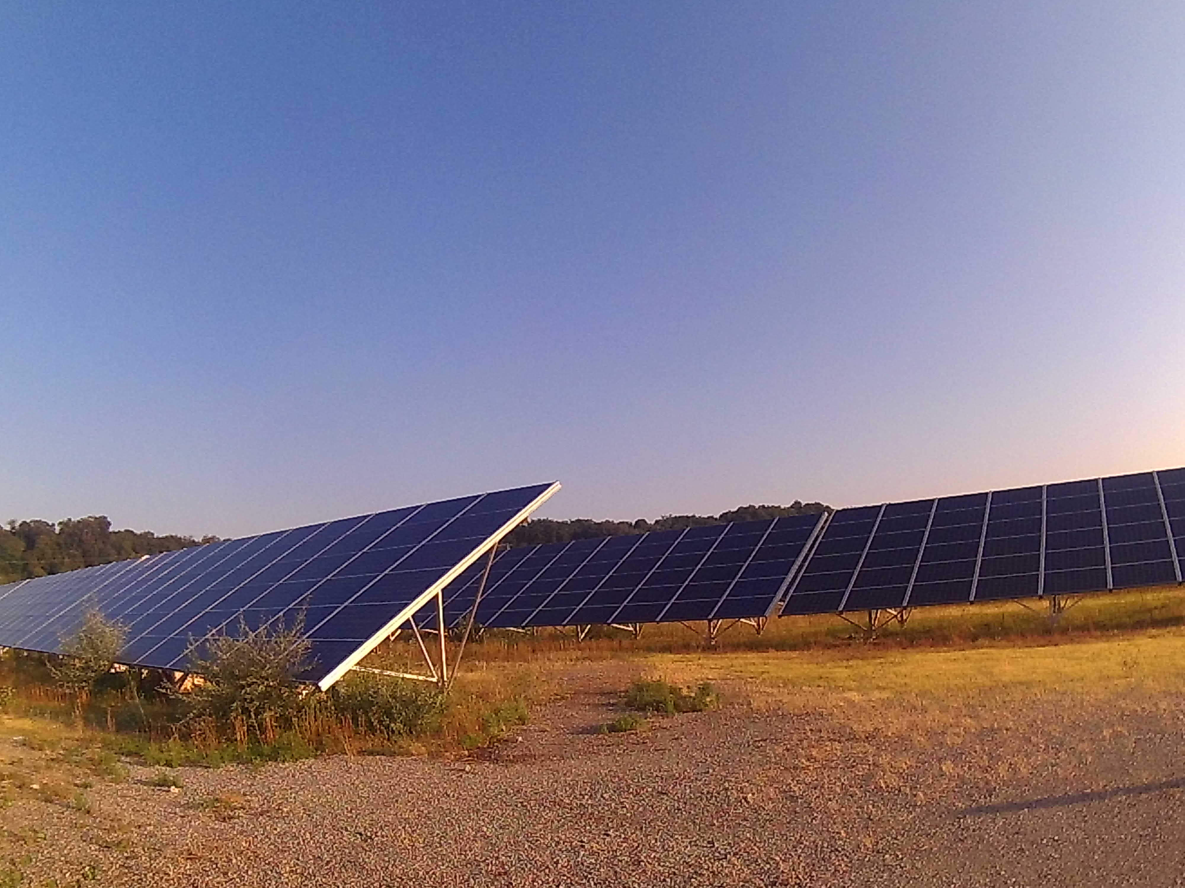 Ferme Solaire - Panneaux Solaire - Puissance globale : 6 MW sur un terrain de 11 ha